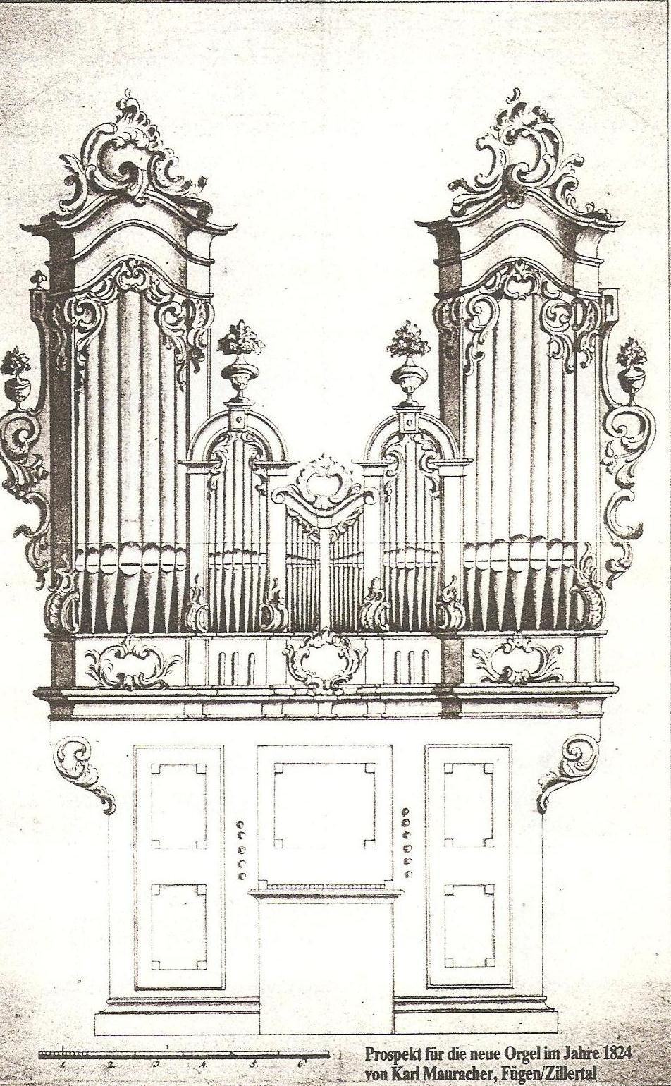 Entwurf Karl Mauracher Orgel Oberndorf 1824